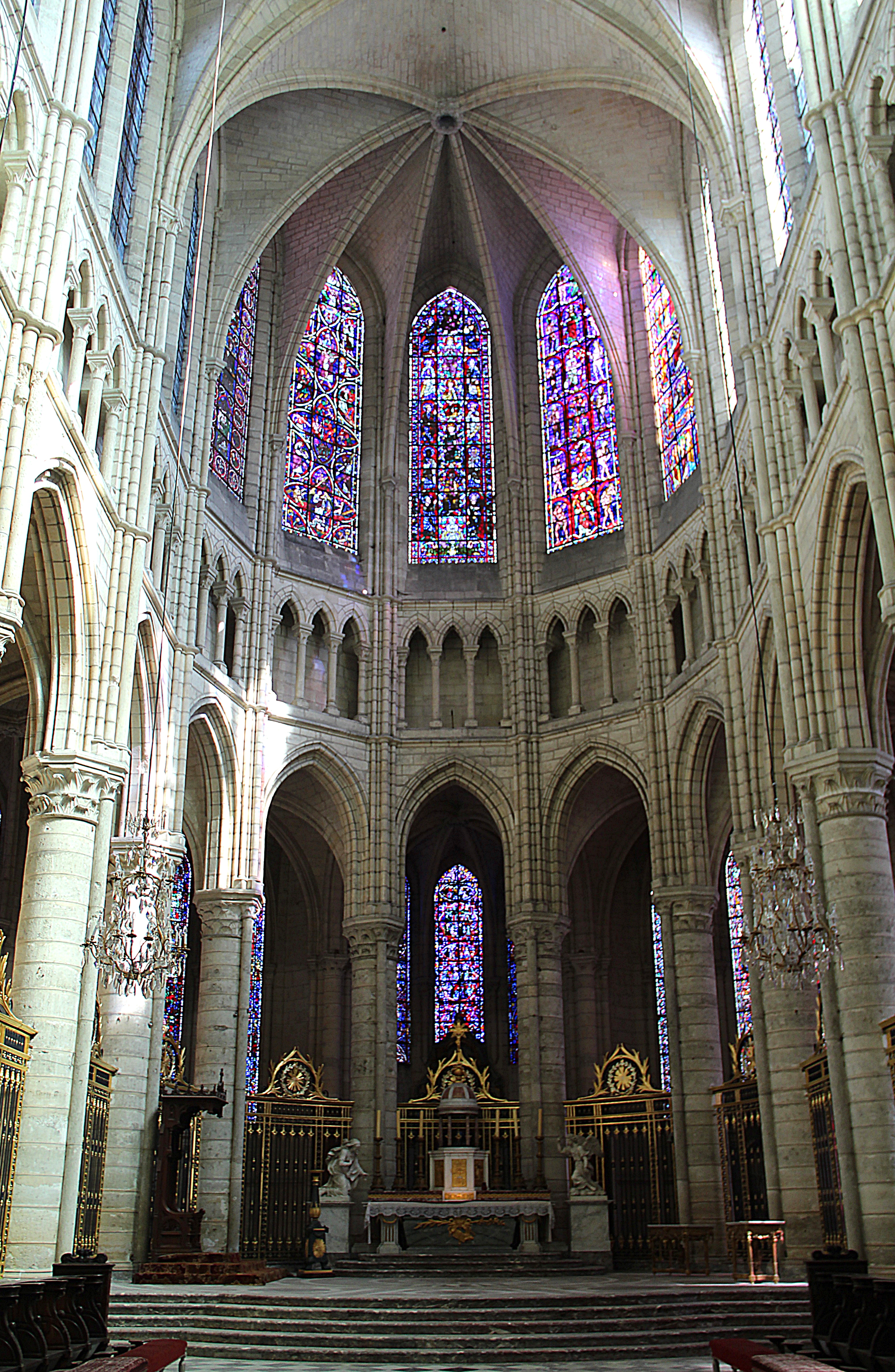 Chœur de la cathédrale Saint-Gervais-et-Saint-Protais (Aisne, France).